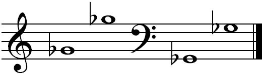 koobak